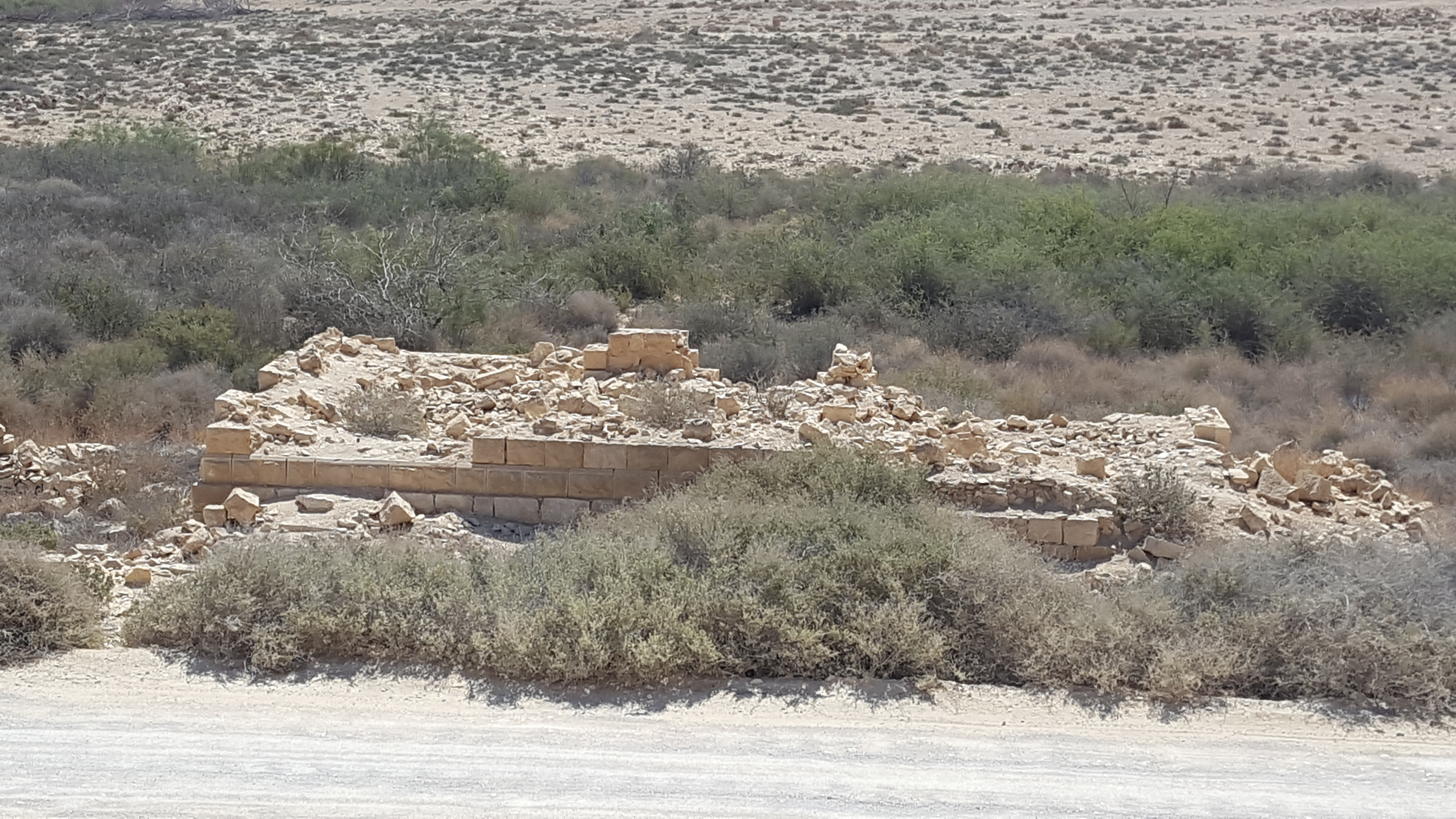 שרידי תחנת הרכבת הטורקית בעזוז